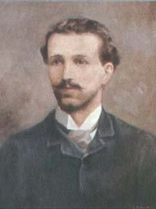 Retrato de José Asunción Silva